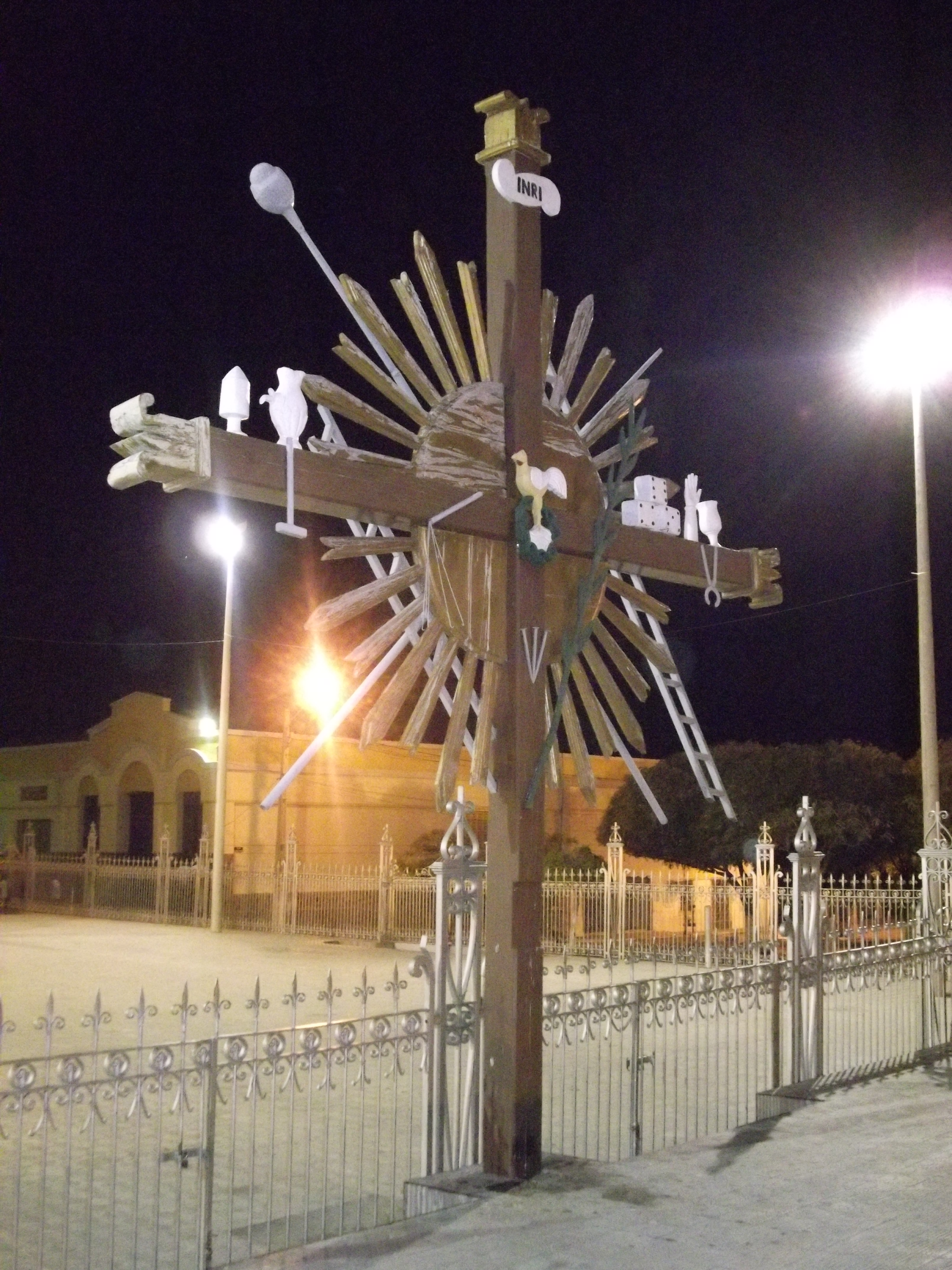 Basílica de São Francisco das Chagas (Canindé)